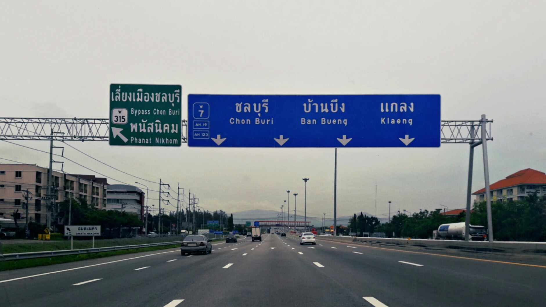 มุ่งหน้าชลบุรี